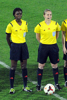 a_5_5435